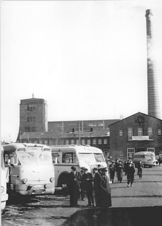 Zwickau, Steinkohlewerk, Schichtwechsel Zentralbild Gahlbeck 22.3.1962 Sicherheit für die Bergleute...das ist der oberste Grundsatz in allen Untertagebetrieben unserer Republik. Unser Reporter besuchte das Steinkohlenwerk "Martin Hoop" in Zwickau und stellte dabei fest: In jeder Abteilung sind jeweils zwei Brandspürer und Wetterleute zu ständigen Kontrollen unterwegs. Automatische Anzeigeanlagen, die zentral beim Dipatcher zusammenlaufen, gewährleisten eine sichere Kontrolle der Schachtanlage, die noch verstärkt wird durch ein dichtes Telefonnetz mit ca. 250 Anschlüssen. 700 Handfeuerlöscher, über 200 C-Rohr-Wasseranschlüsse sowie Gesteinsstaubsperren zum Eindämmen evtl. auftetender Explosionen sind weitere Sicherheitsvorkehrungen. Jeder Bergmann empfängt beim Einfahren in den Schacht einen "Selbstretter" zu seinem persönlichen Schutze. Diese Geräte, für deren Wartung und Erneuerung der Betrieb jährlich 300.000 DM ausgibt, schützt den Kumpel vor Brandgasen bei Katastrophen und ermöglicht es ihm, bei Gefahr sichere Gänge zu erreichen. Insgesamt verfügt der Betrieb über 6500 dieser Geräte. Schichtwechsel im Schacht IV des Steinkohlewerkes "Martin Hoop" in Zwickau. Information added by Wikimedia users.